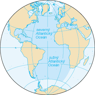 Atlantický oceán, slovenské popisky Source: sk modifikacia z Ocean.png Image:Atlantic Ocean.png This work has been released into the public domain by its author, Julo. This applies worldwide.In some countries this may not be legally possible; if so:Julo grants anyone the right to use this work for any purpose, without any conditions, unless such conditions are required by law.